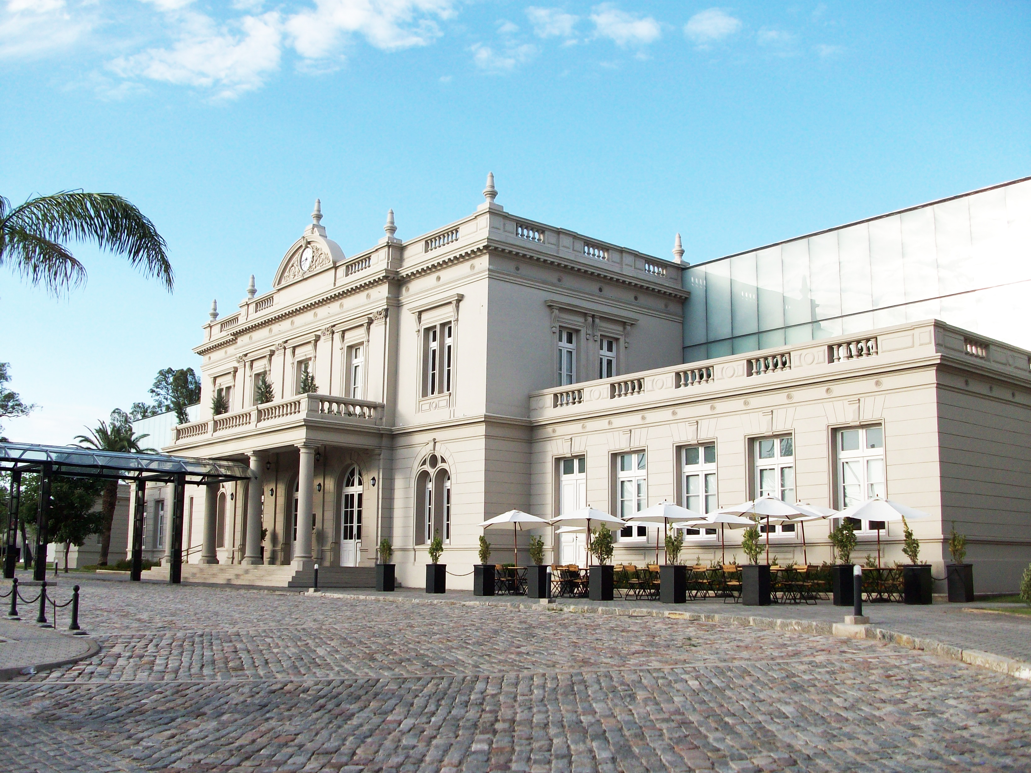 Fachada principal del Forum Santiago del Estero Centro de Convenciones y Exposiciones sobre calle Perú.